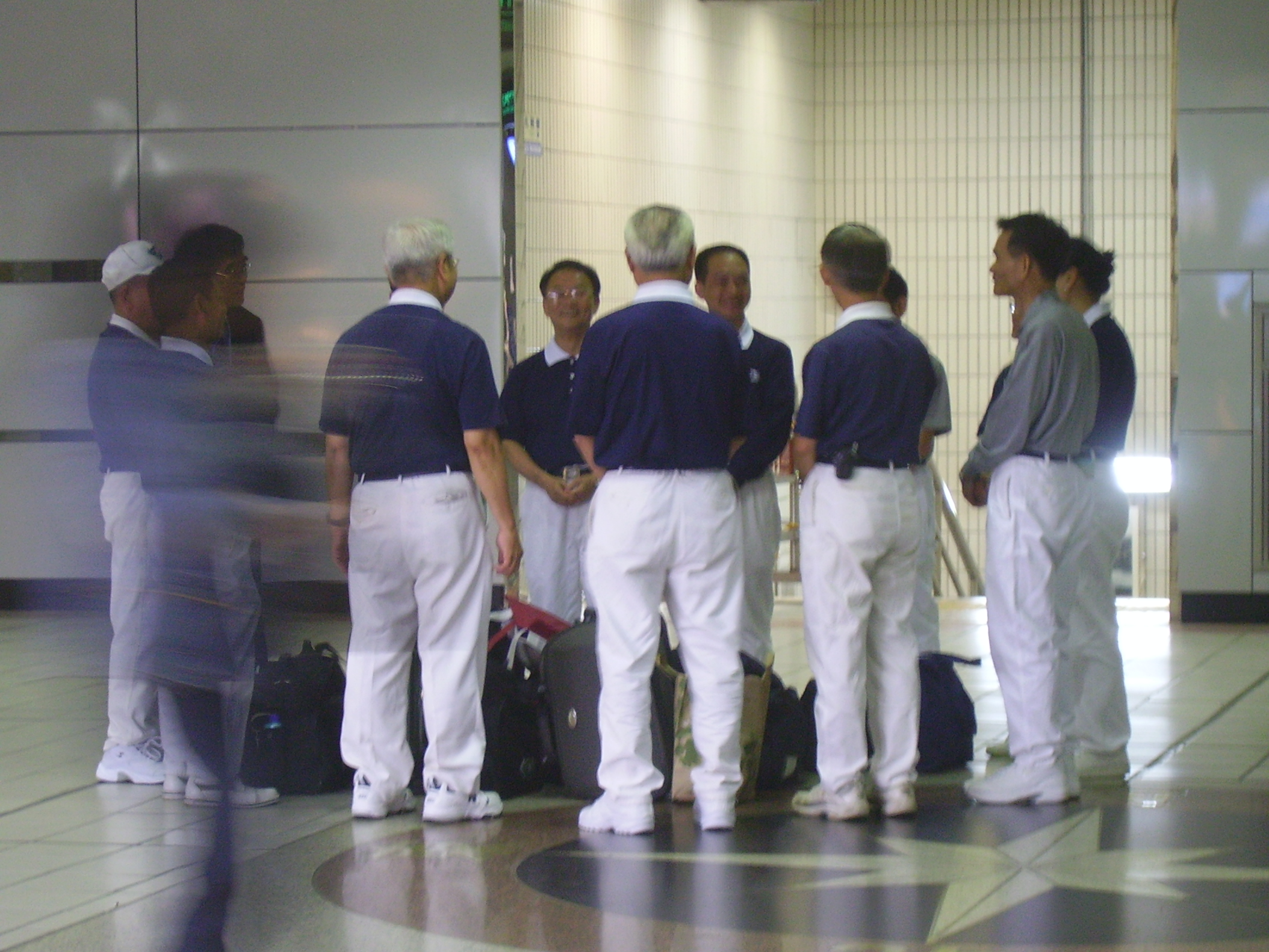 中文（台灣）: 慈濟人聚集臺北車站1樓。